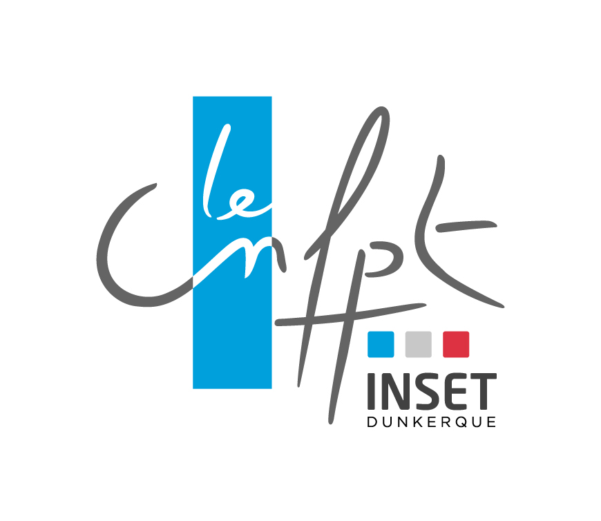 Logo adopté en 2011 pour l'INSET de Dunkerque du CNFPT